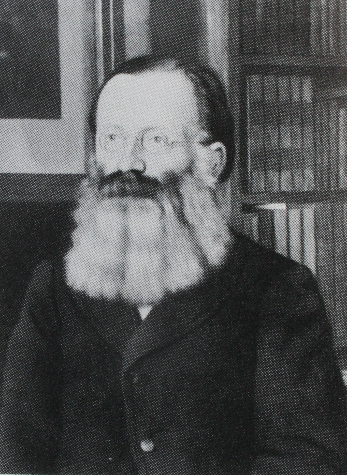 Heinrich Wettstein, ehemaliger Direktor Seminar Küsnacht